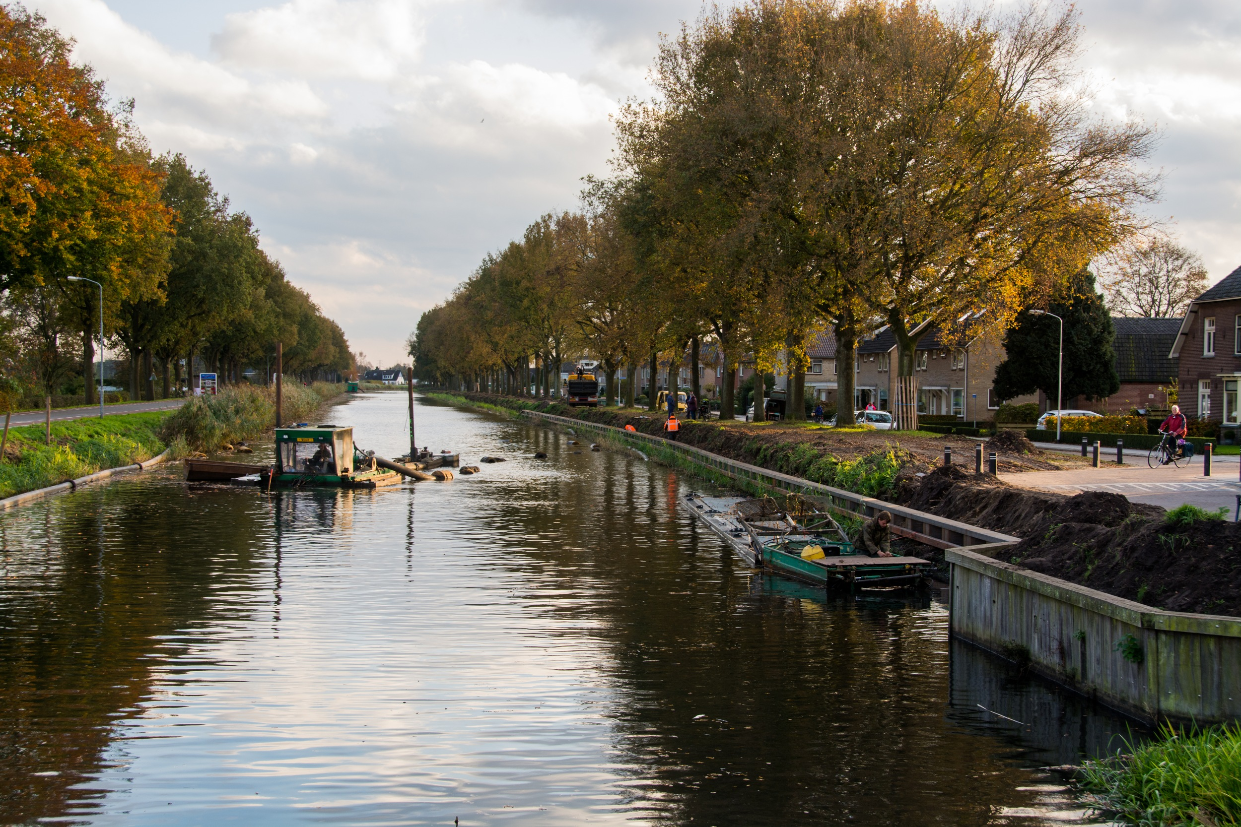 Men is drukdoende het kanaal uit te baggeren d.m.v. de bodem te stofzuigeren. Hierdoor zal scheepsvaart mogelijk zijn wanneer de bruggen weer beweegbaar gemaakt zijn.